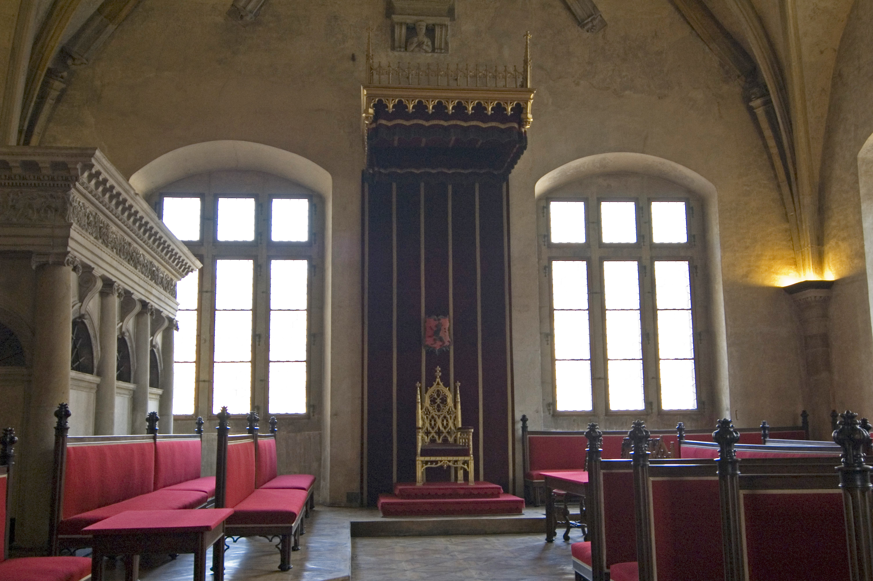 Pražský hrad, Starý královský palác, Sněmovna